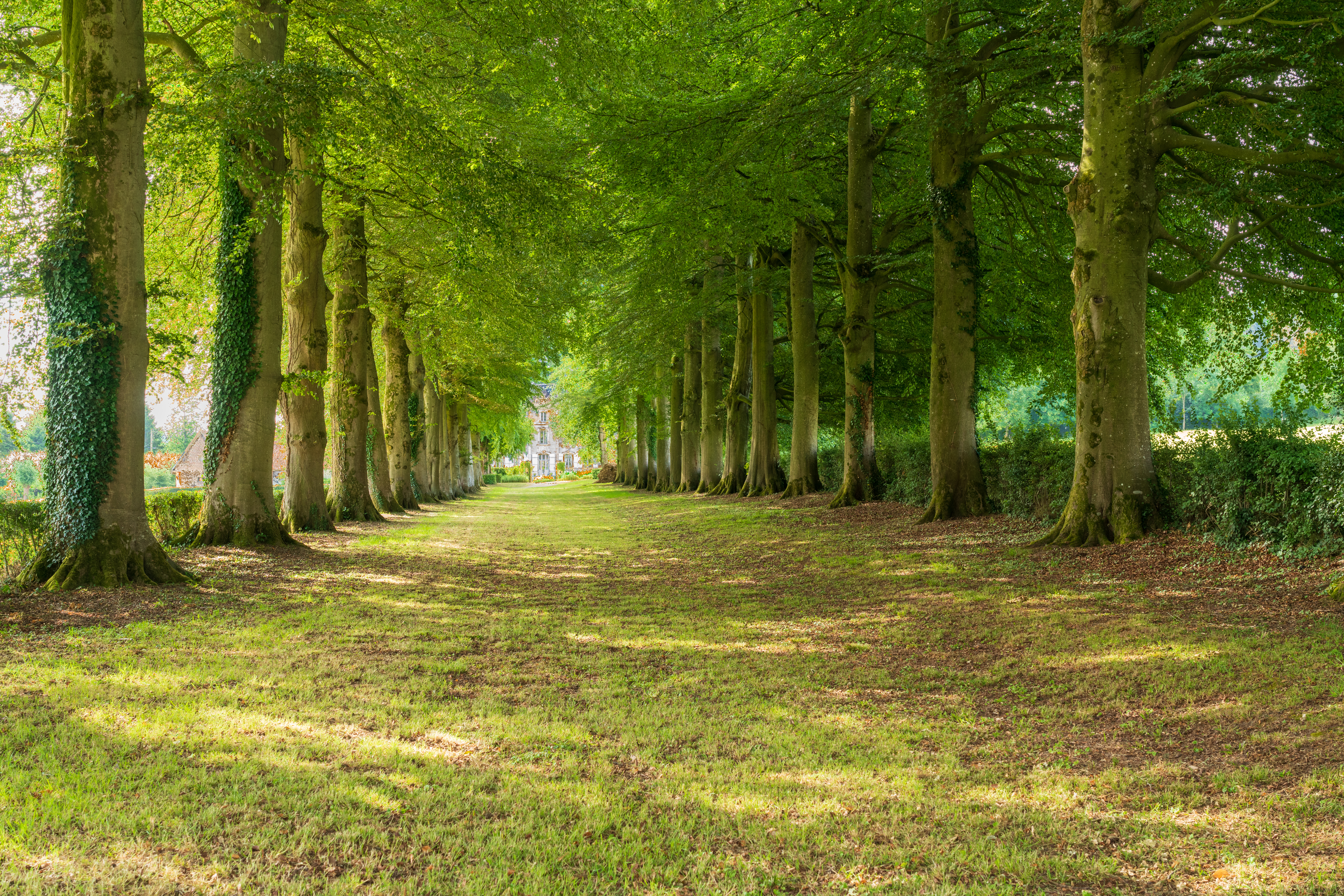 Le château est privé. Il se situe 18 route du Petit-Parenty à Parenty - Pas-de-Calais - Hauts de France